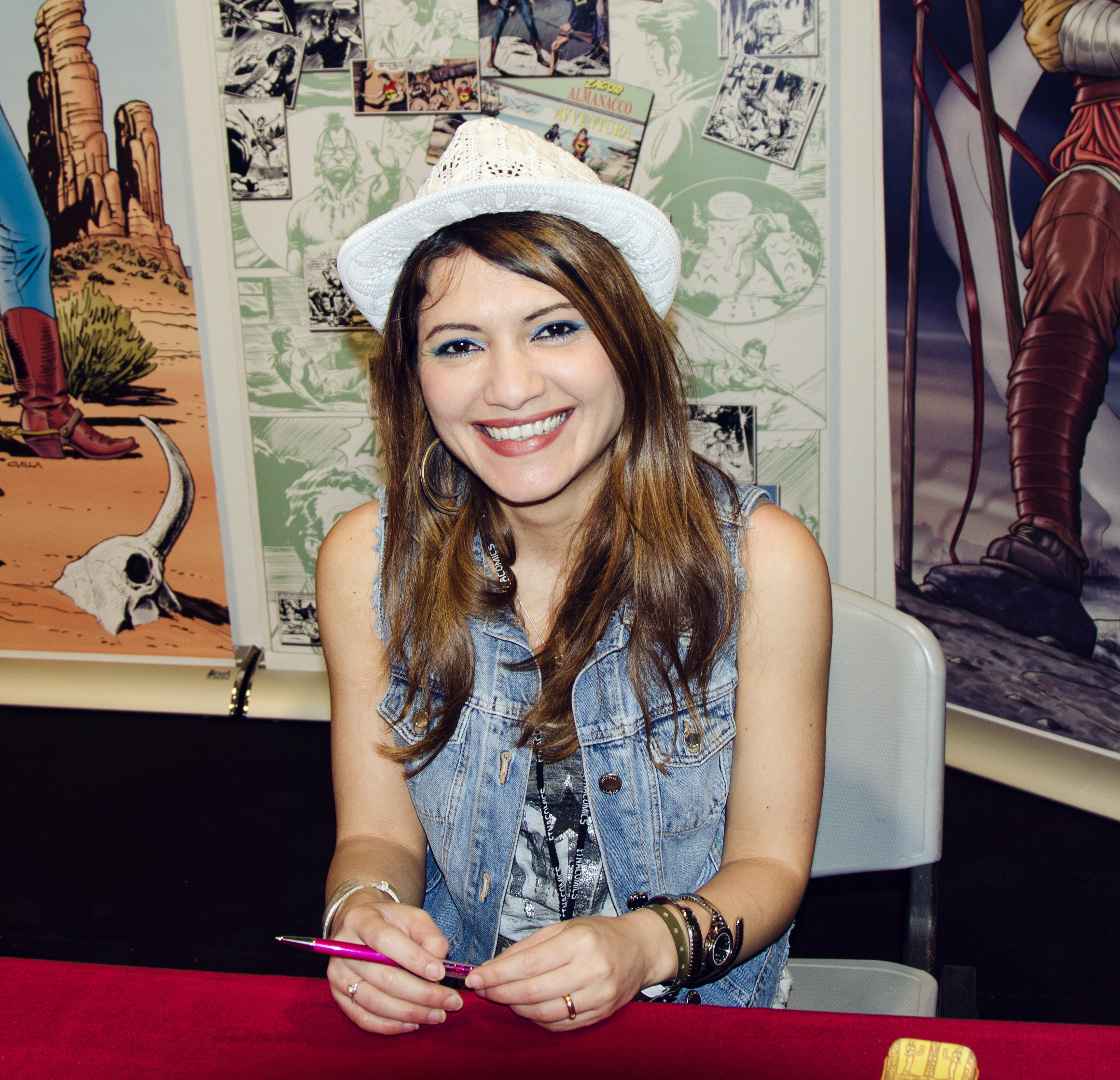 Val Romeo presso Etna comics 2015